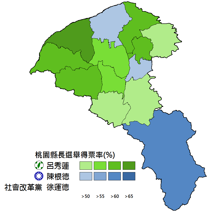 1997年桃園縣長選舉。